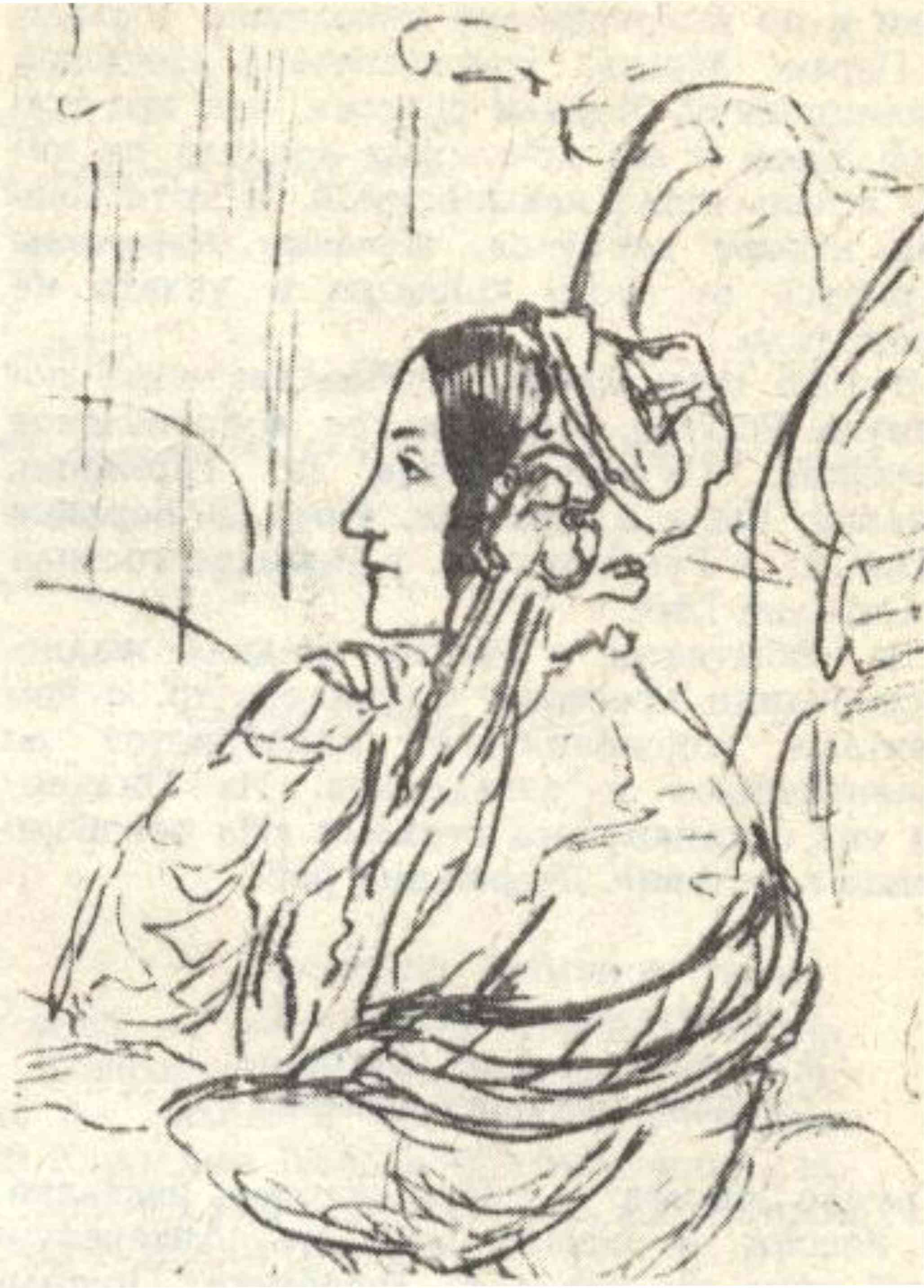 Каролина Карловна Павлова. Рисунок Э. А. Дмитриева-Мамонова из альбома А. П. Елагиной